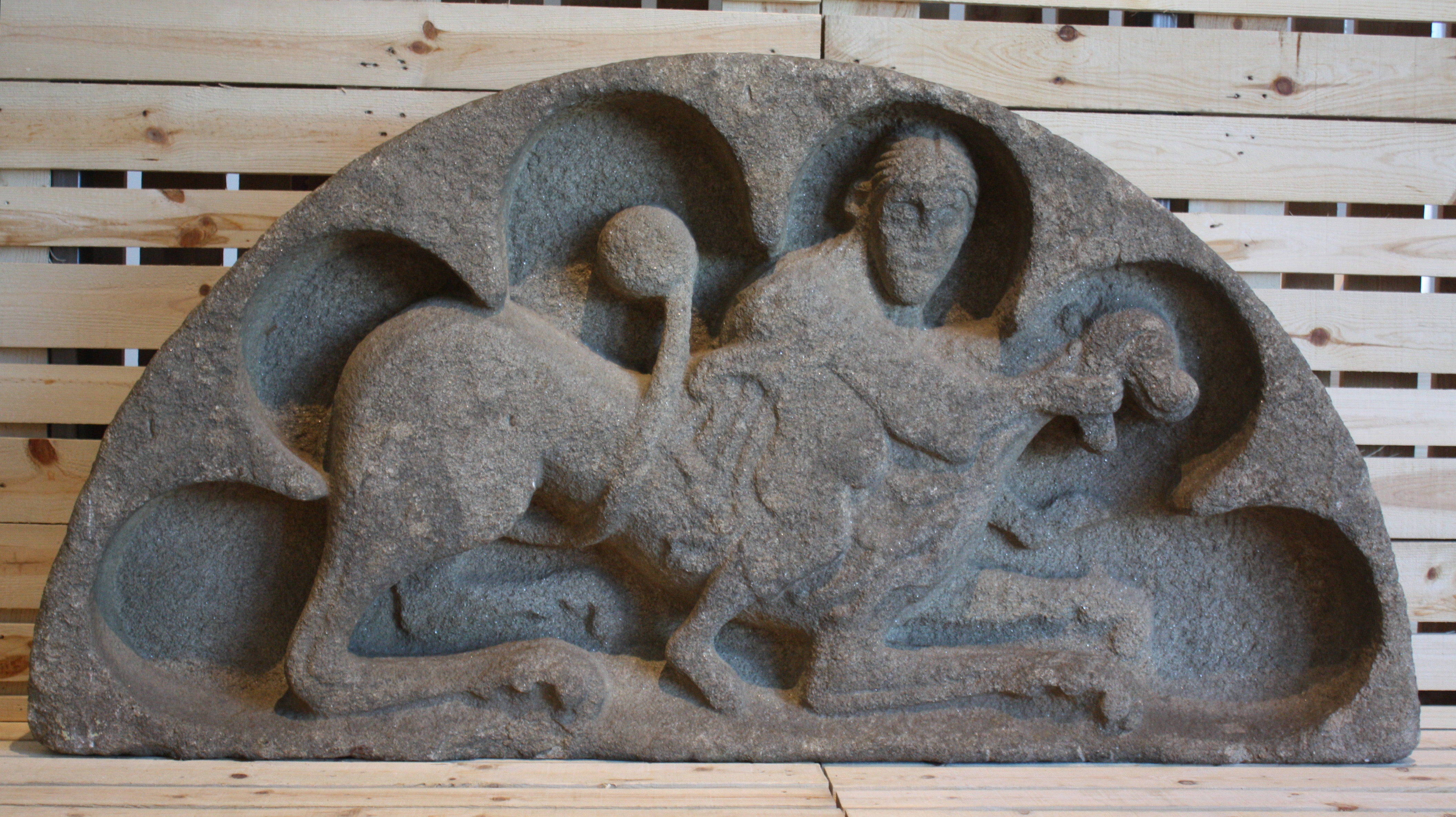 Tímpano que representa a loita de Sansón e o león, procedente da igrexa de San Xoán de Palmou (Lalín, Pontevedra). Hoxe no Museo de Pontevedra.